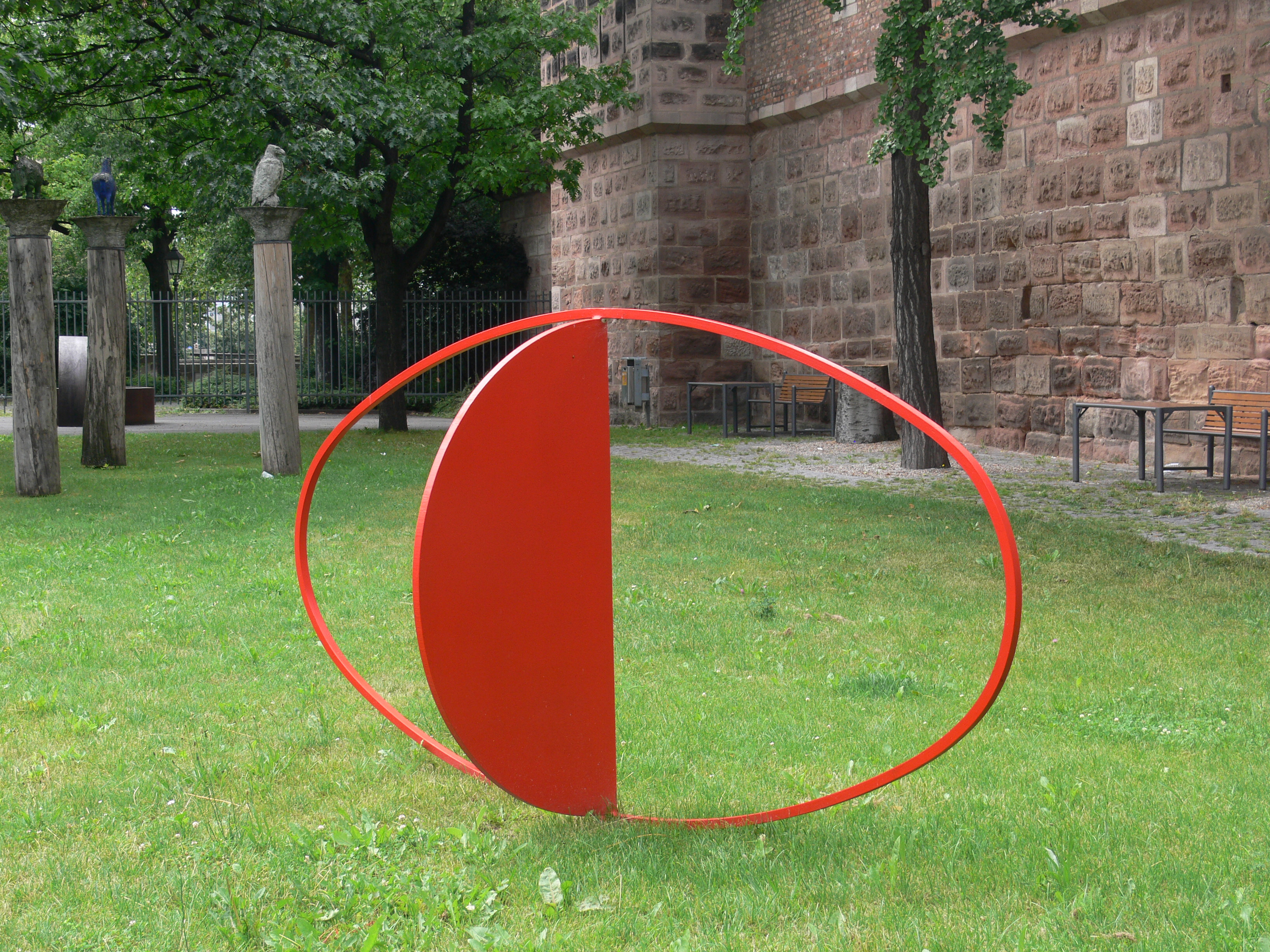 Skulpturengarten Nürnberg (Zwinger der Frauentormauer) Bernd Klötzer: Fuge 2, 2004, dreiteilig geschnittene, lackierte Eisenplatte, ausgeschnittener Ring beigestellt